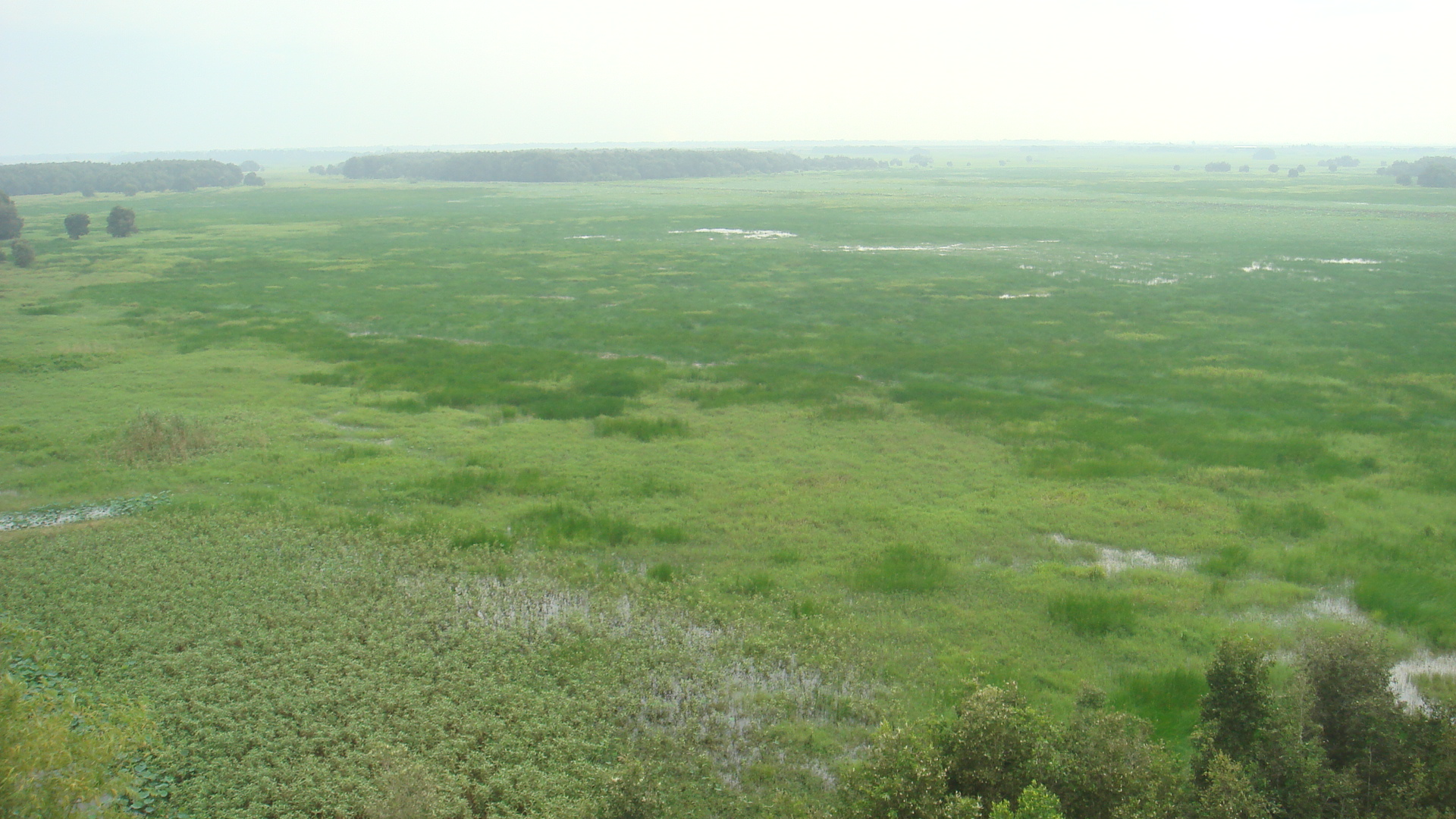 Đồng Tháp Mười from above.